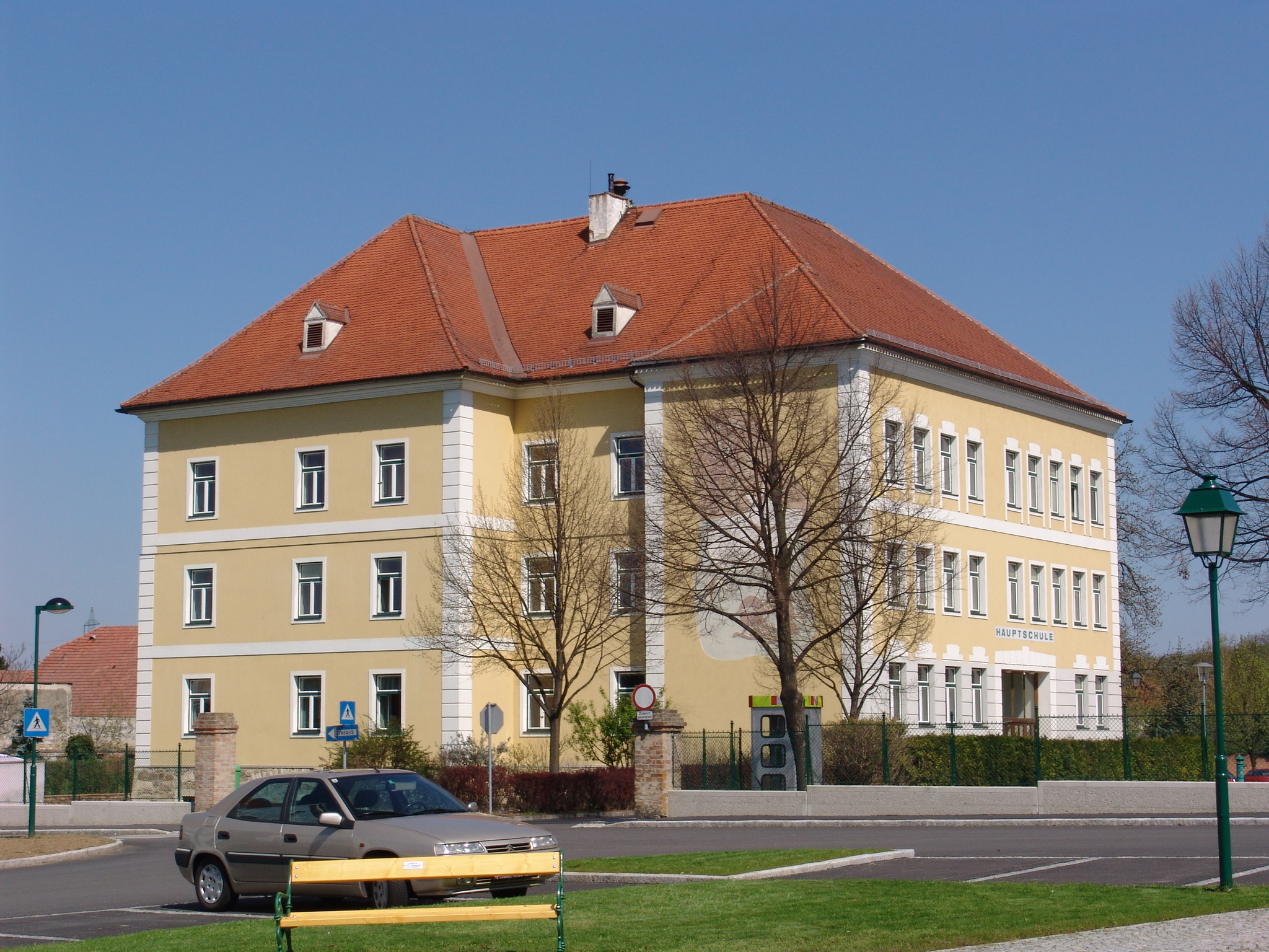 Hauptschule in Sitzendorf Hauptplatz 1